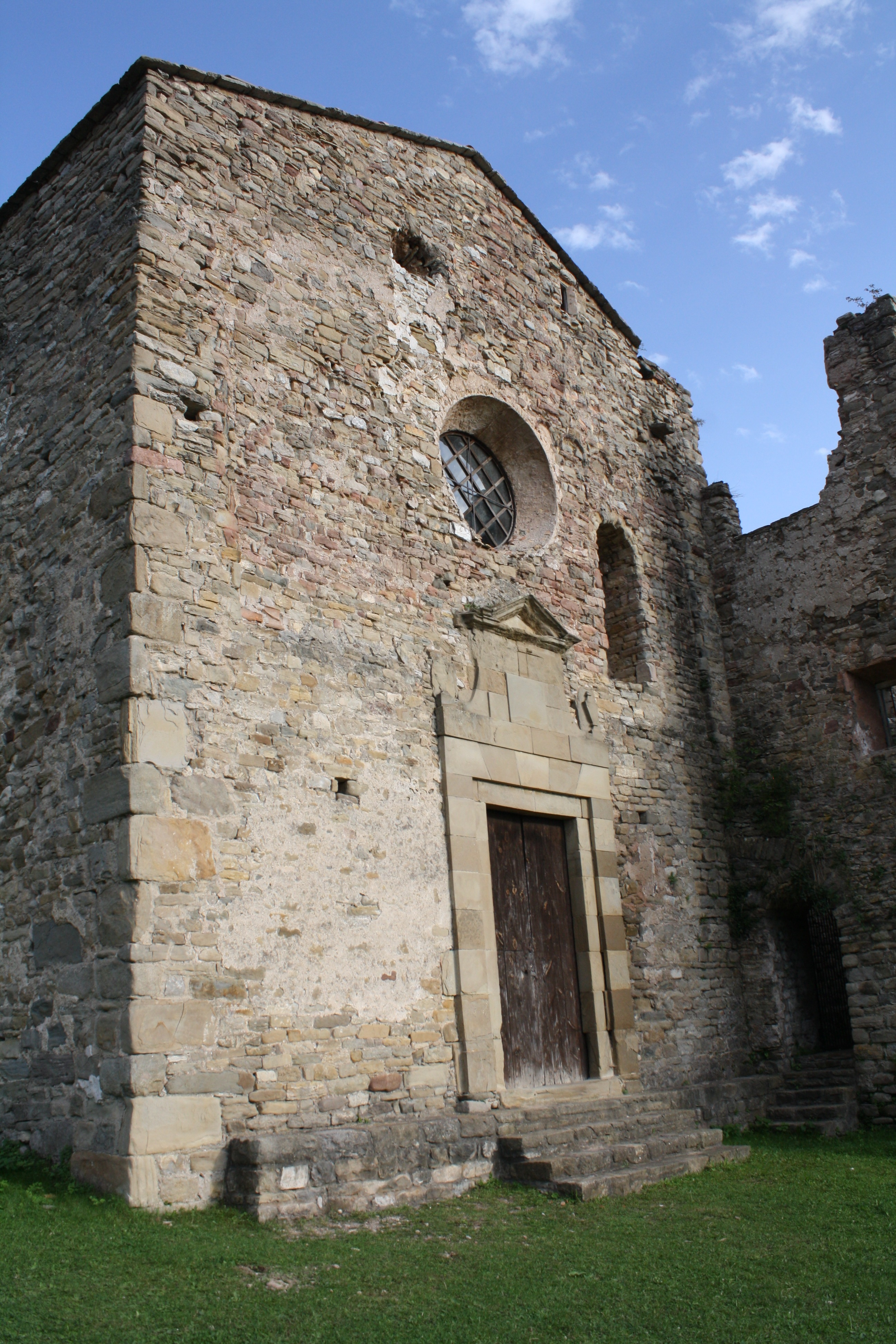 Entrada lateral del Monestir de Santa Maria de Lillet (s. XII, XIV, XVIII).